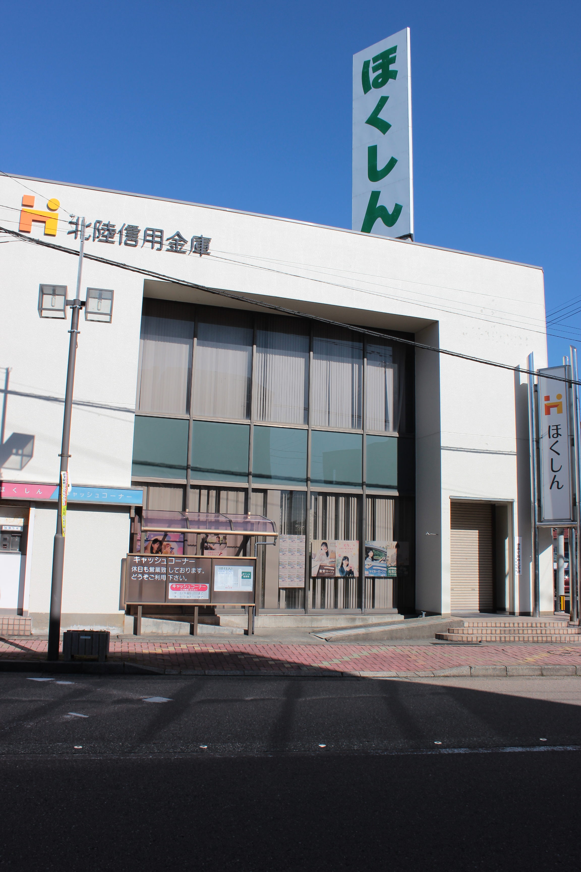 北陸信用金庫粟津支店（石川県小松市）、旧ロゴマークと新ロゴマークが混在している。 Canon EOS Kiss X5